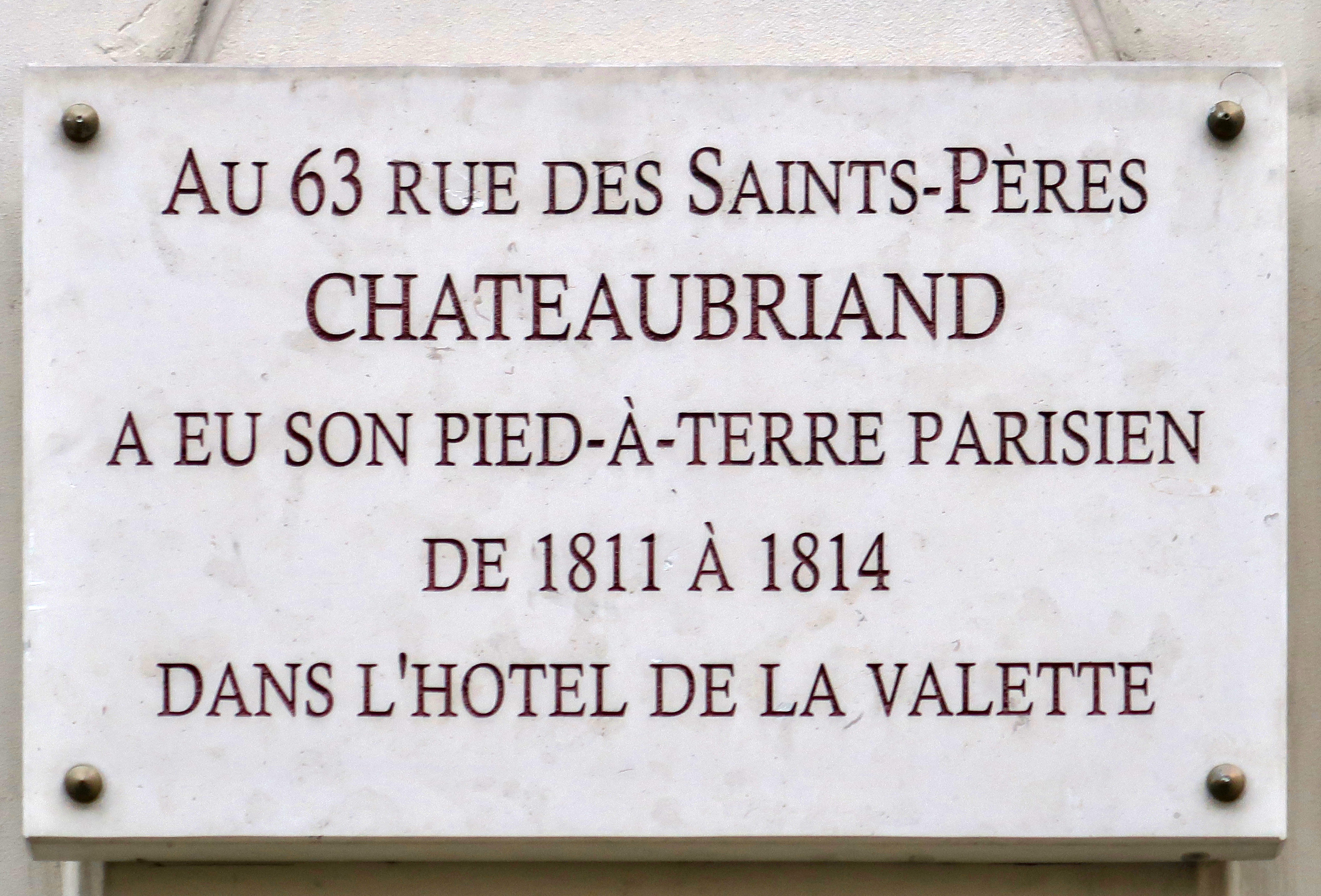 Plaque en hommage à Chateaubriand , 63 rue des Saint-Pères (Paris, 7e).